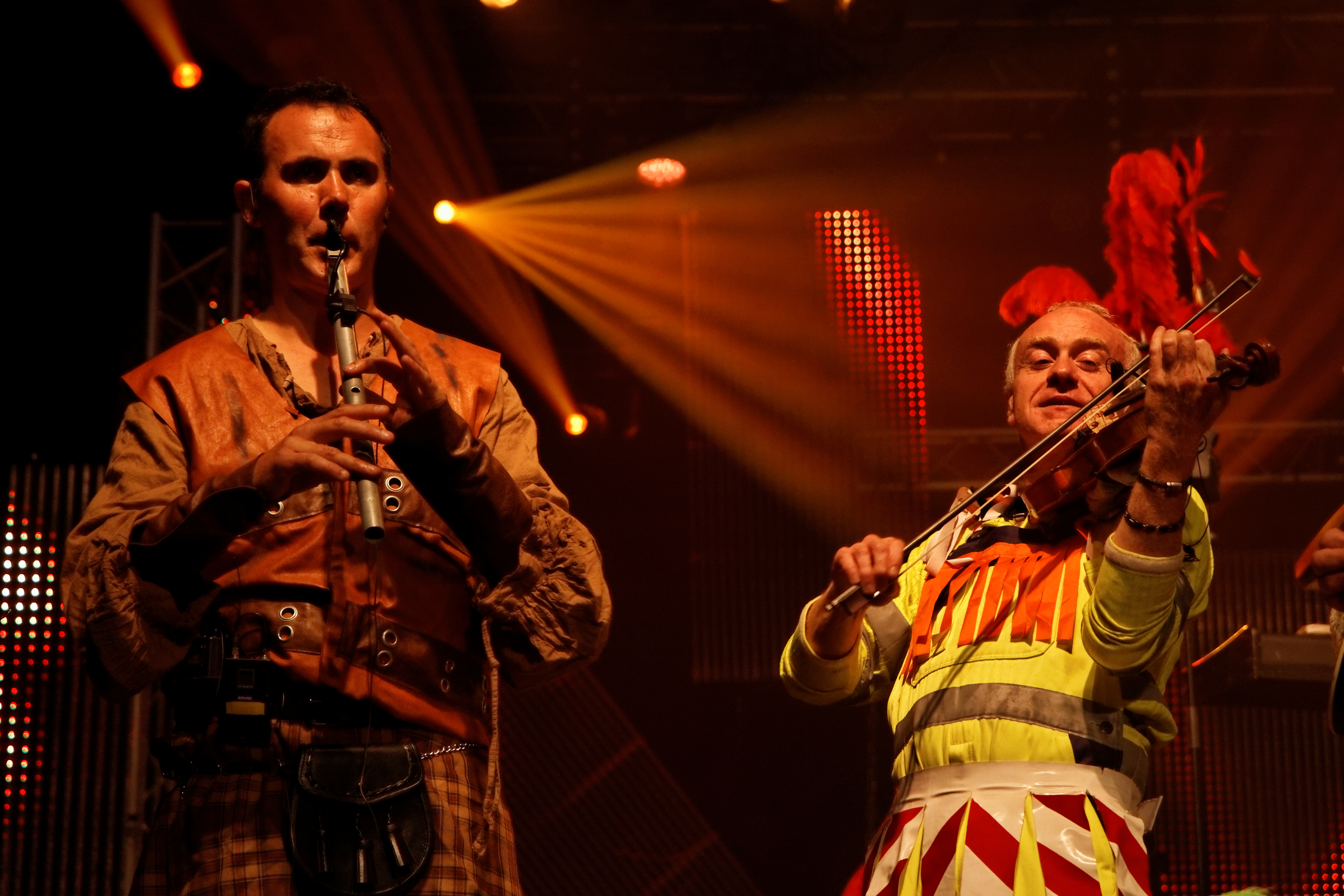 Tri Yann en concert à l'espace Gradlon lors du festival de Cornouaille 2012.